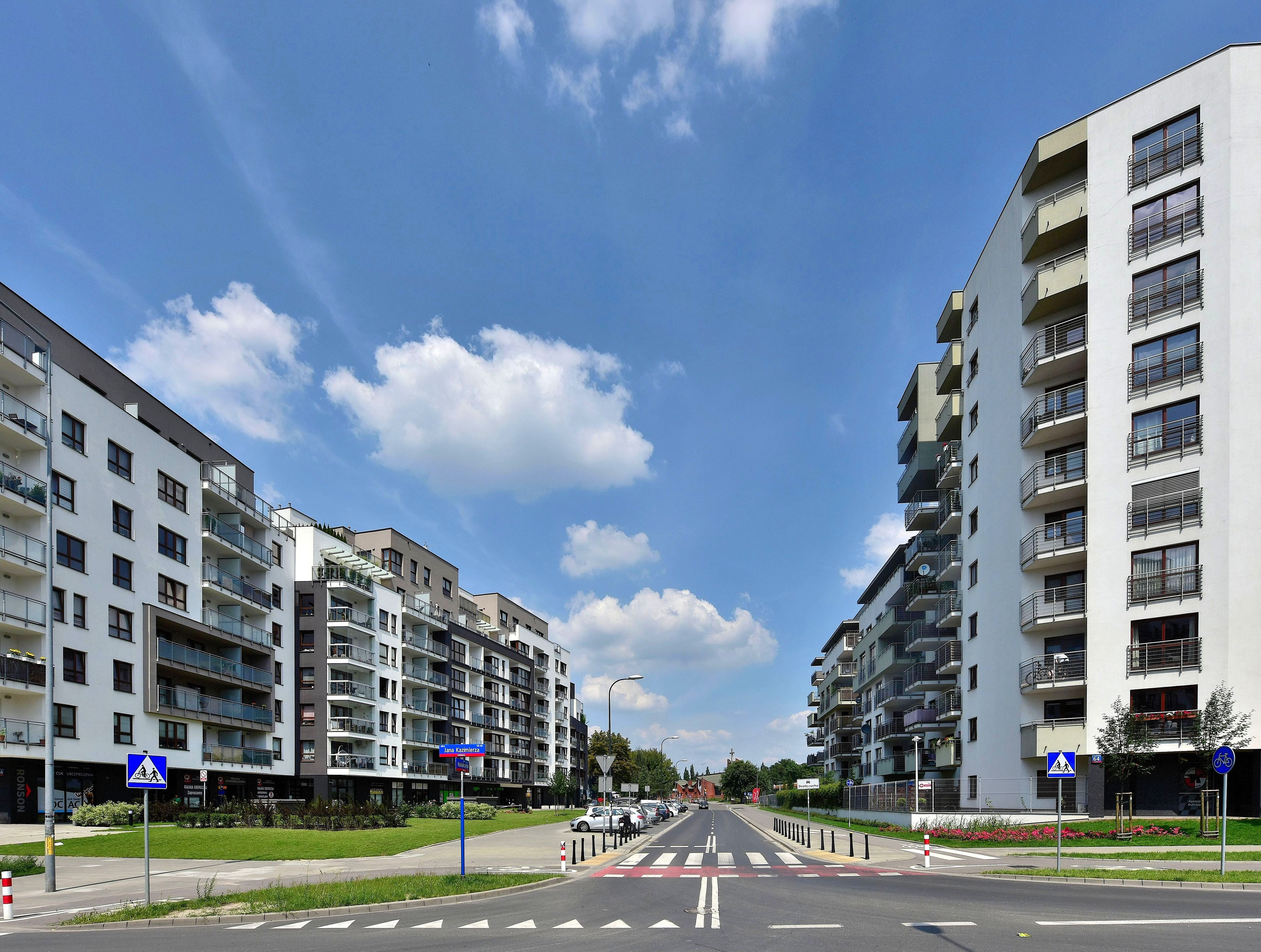 Ulica Hubalczyków przy Jana Kazimierza w Warszawie